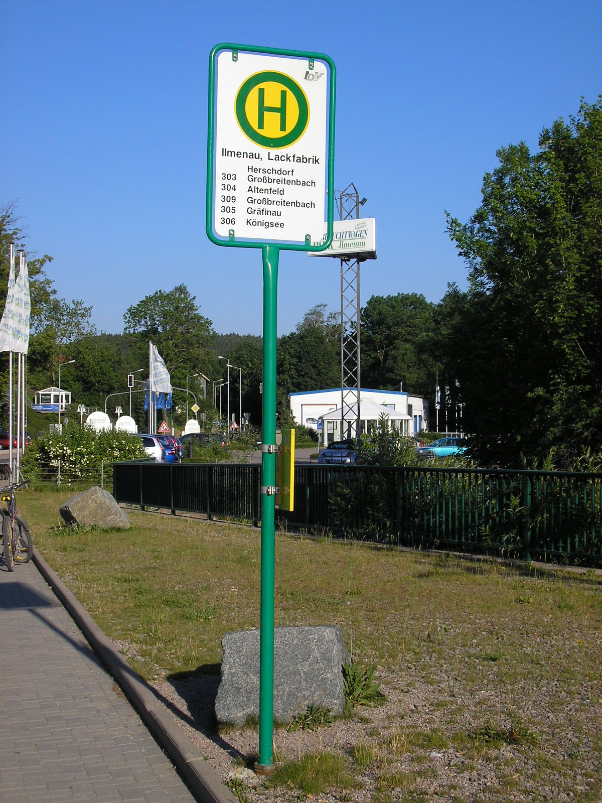 Ein Bushaltestellenschild der Verkehrsgesellschaft "IOV" in Ilmenau (Thüringen)